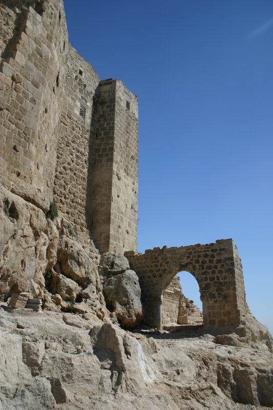 eigenes Foto von 2004, public domain Mewes 13:47, 20. Feb 2005 (CET) äußeres Tor